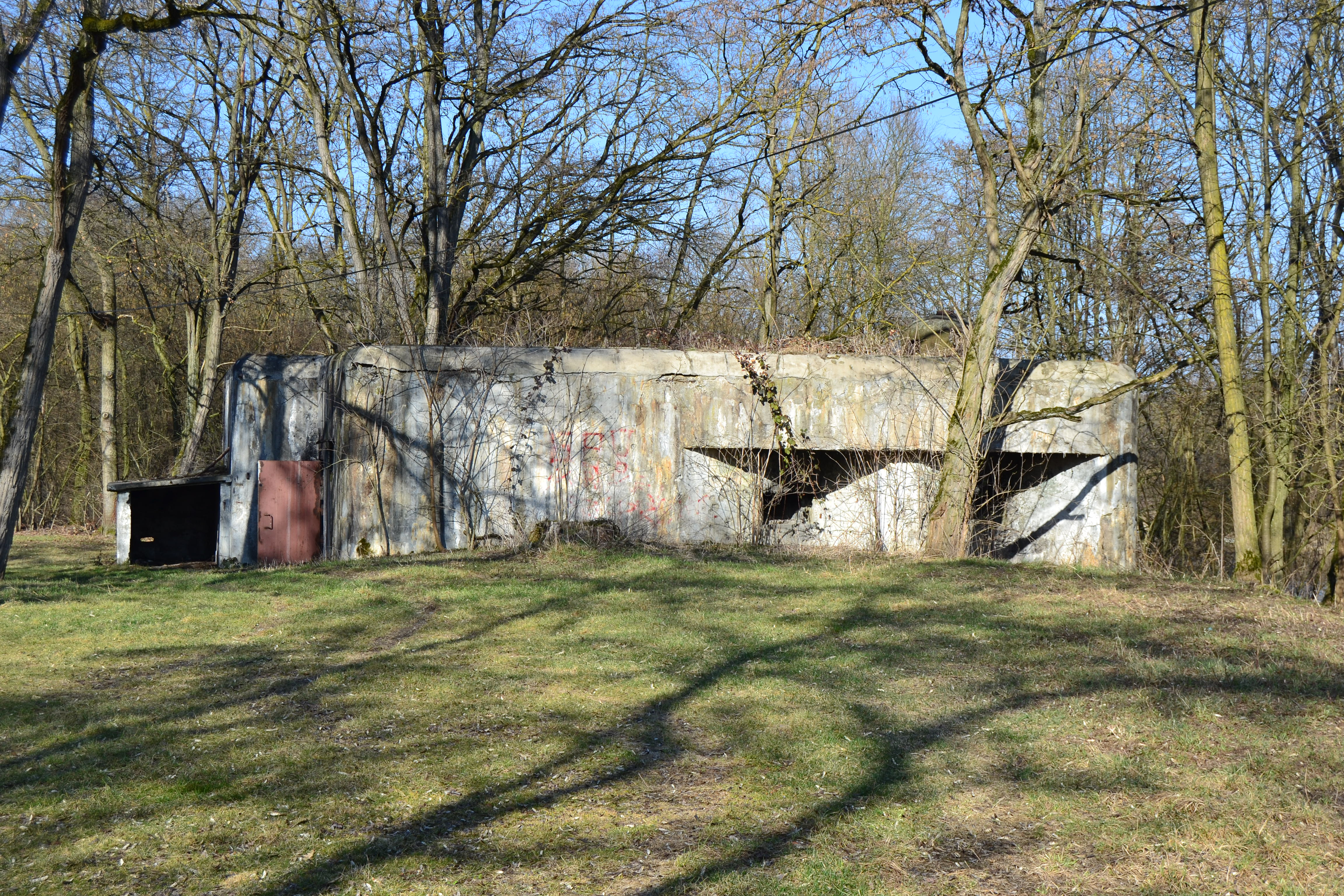 Casemate CORF double d'infanterie de berge (type M2P) n°11/1 Chalampé-Berge-Nord. Chalampé, Alsace, France